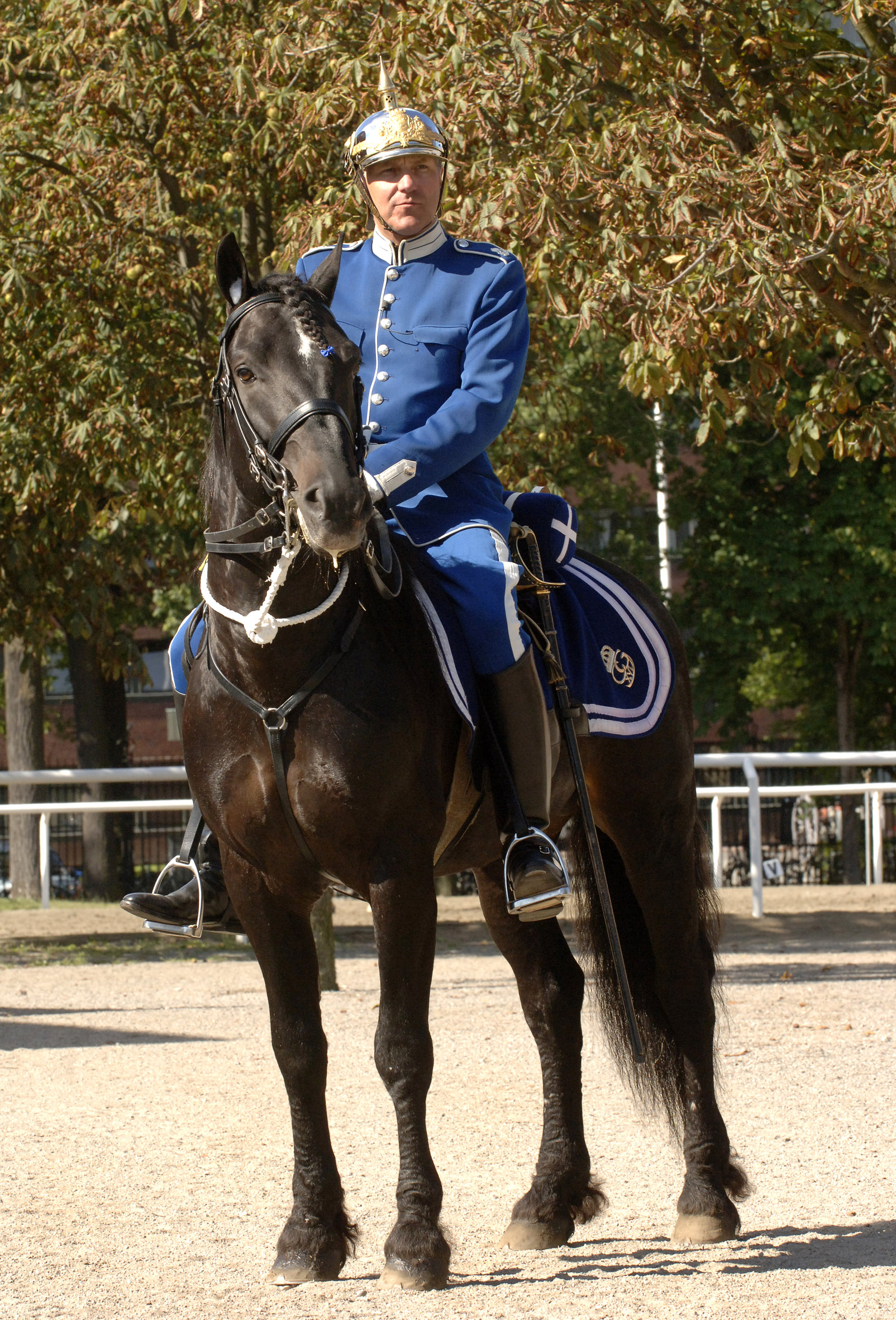 Kallblodstravaren Järvsöfaks med sin kusk och tränare Jan-Olov Persson, deltar i beridna högvakten vid Stockholms Slott.